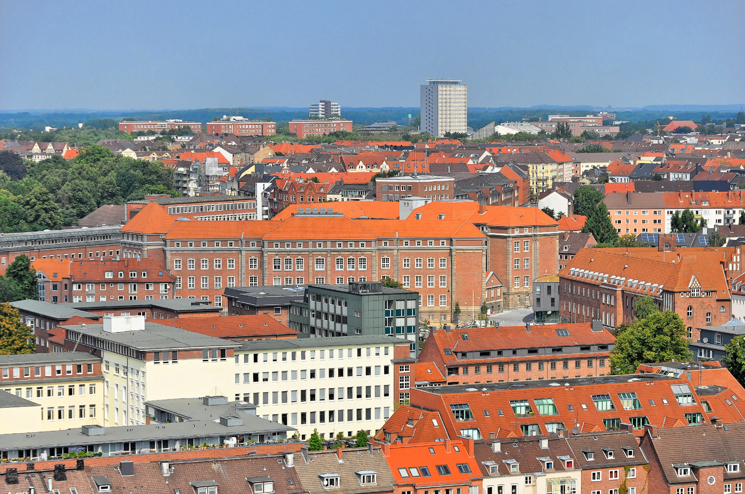 Kiel, Bilder wärend des Landtagsprojekt Schleswig-Holstein 2013